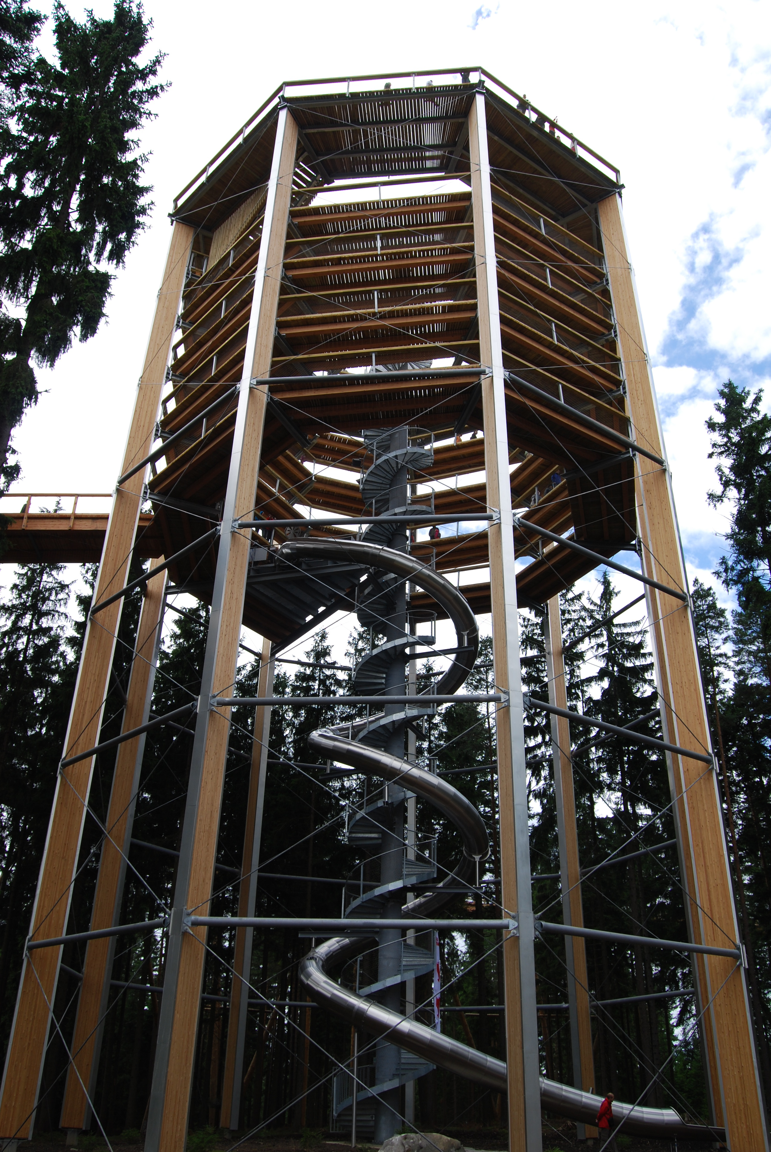 Nejdelší suchý tobogan v České republice (52 metrů) a střed věže. Stezka korunami stromů. Lipno nad Vltavou. Okres Český Krumlov. Česká republika.